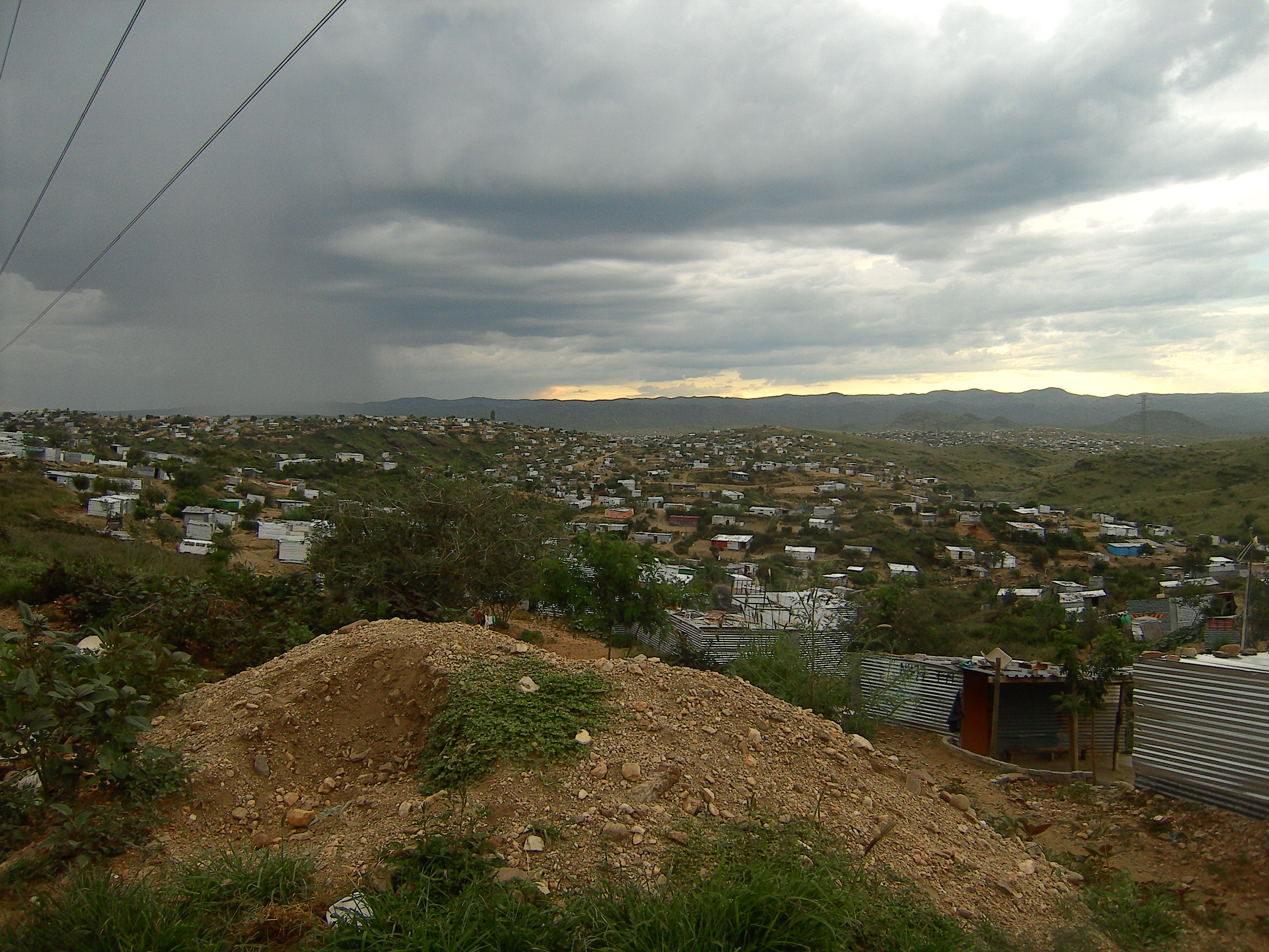 Wellblechhüttensiedlung in Hakahana (2011).